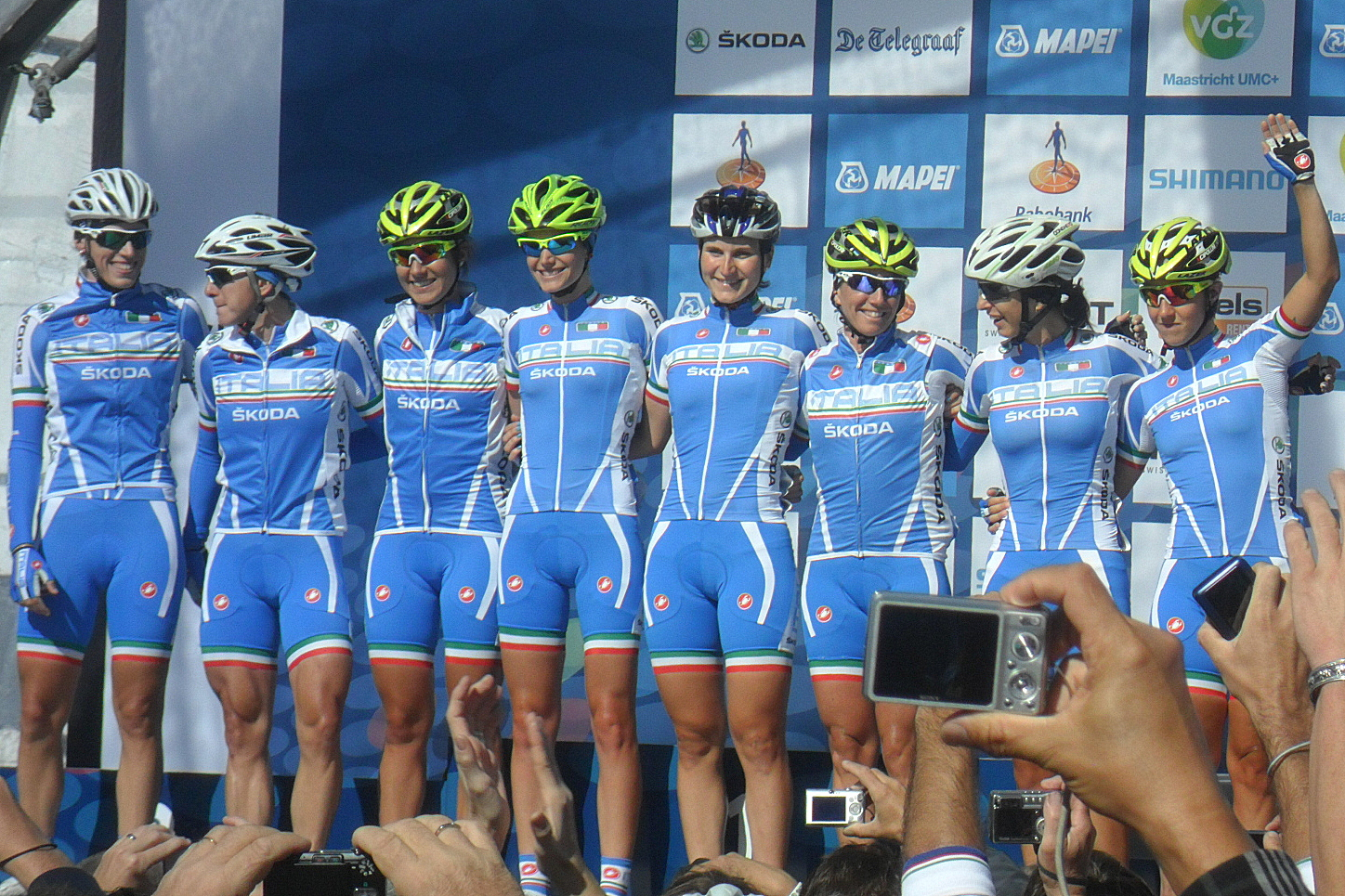 Ploegenpresentatie Italië voor de start van het Wereldkampioenschap 2012 in Valkenburg, Nederland.